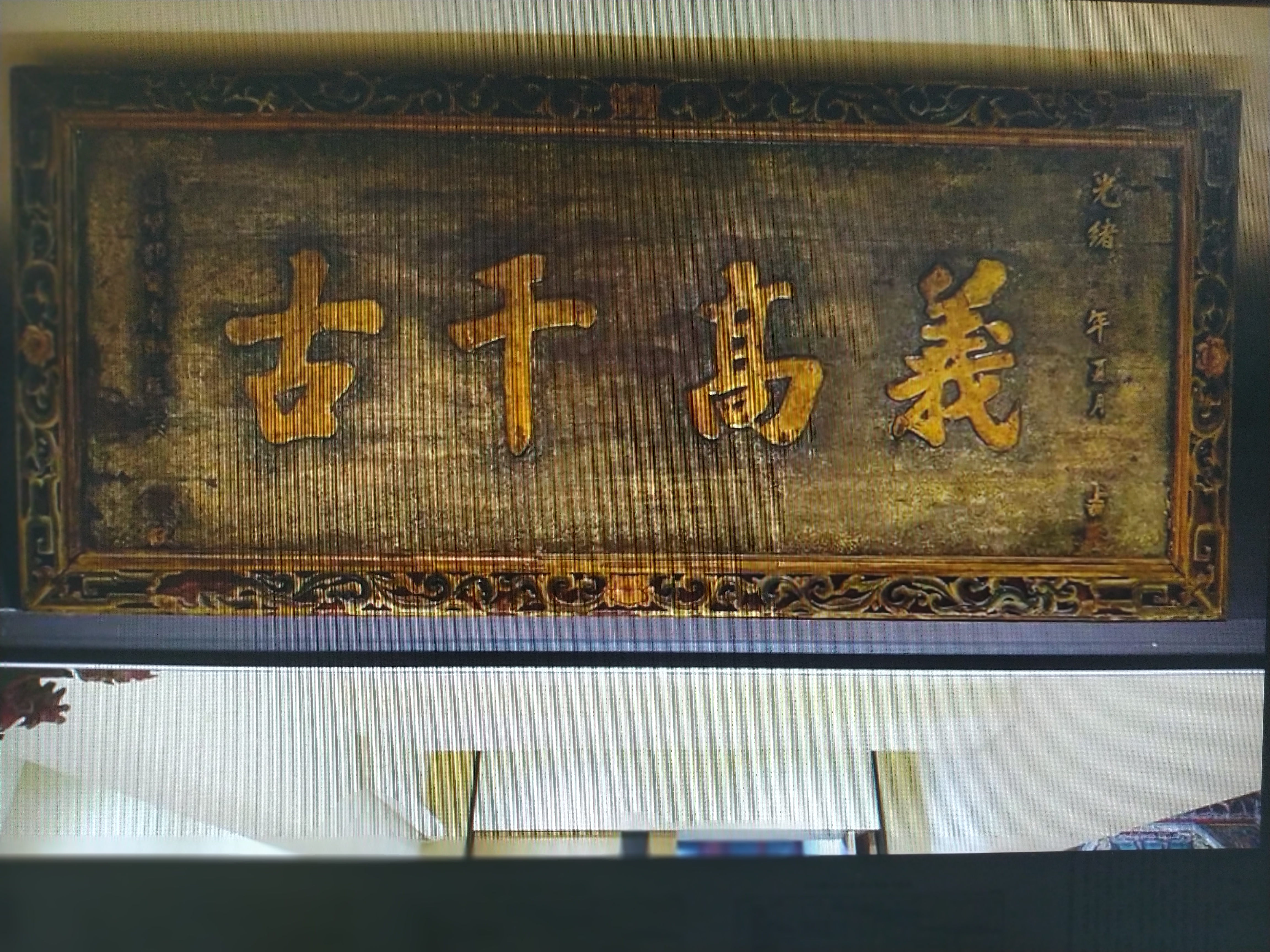 關廟山西宮《義高千古》匾(光緒十四年道標都閫府鄭超英獻)